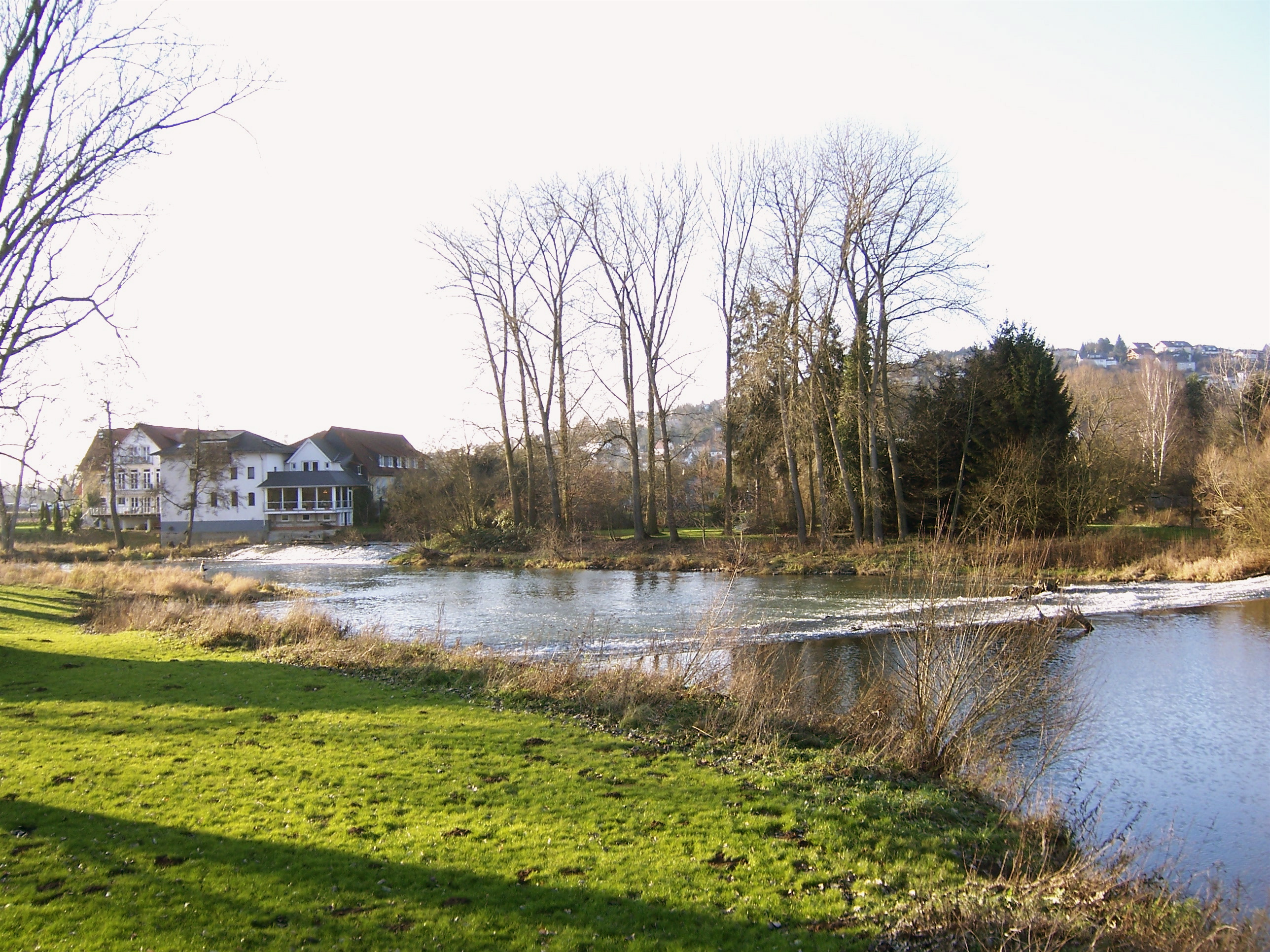 Lahn River and Naunheimer Muehle